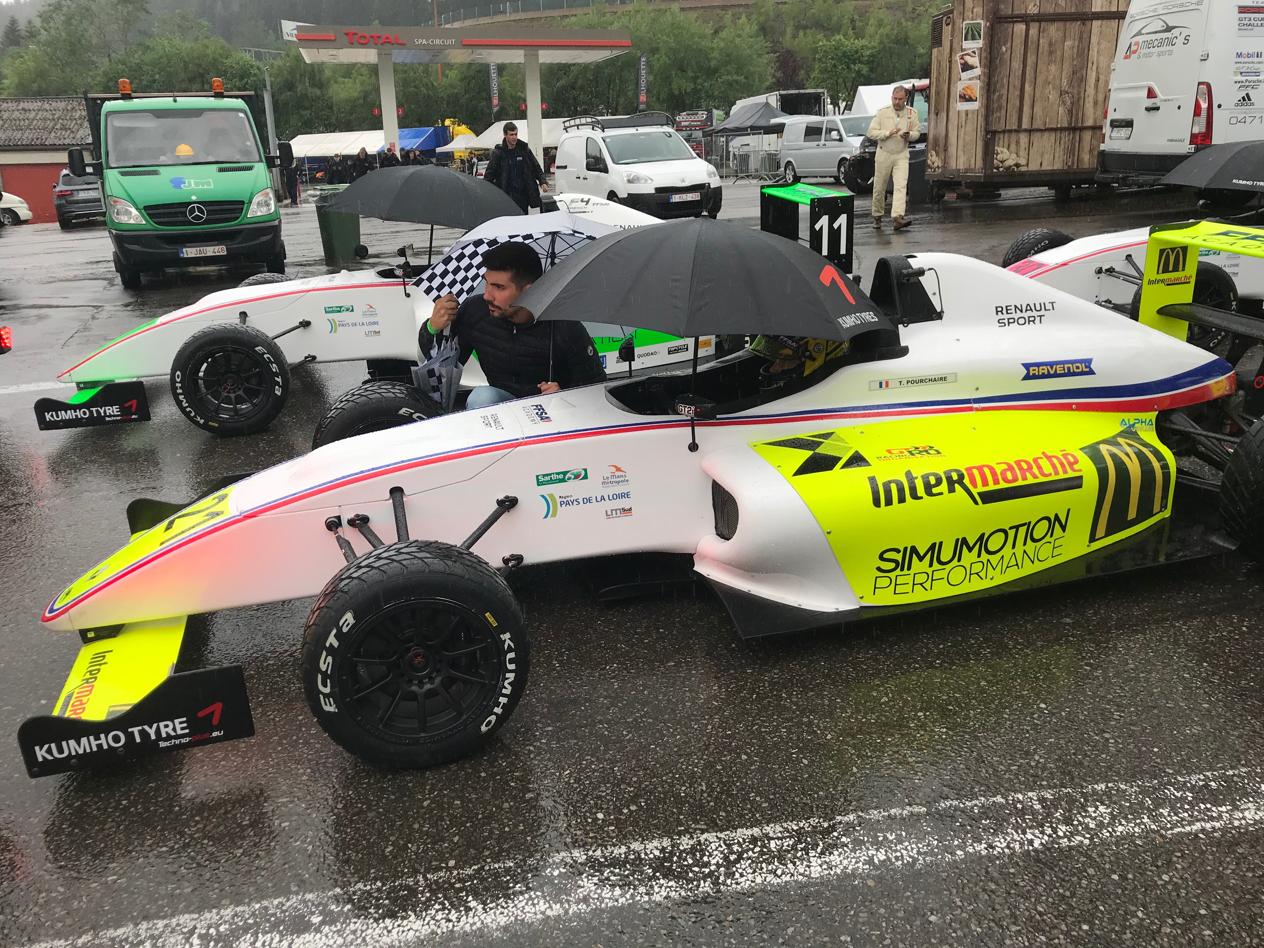 Théo Pourchaire dans sa voiture pour la manche de Spa-Francorchamps en championnat de France de Formule 4 en 2018.